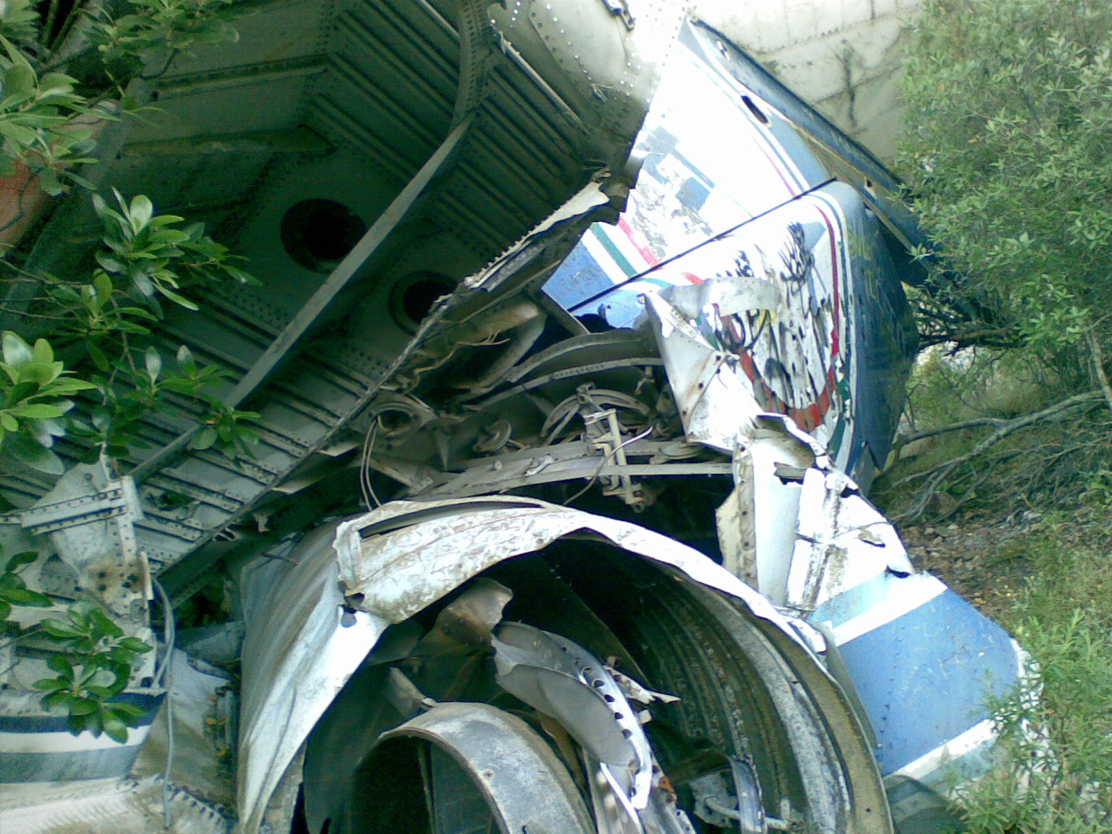 Resti della turbina dell'aereo ATI BM-PT 012 precipitato nei monti di capoterra il 15 settembre 1979